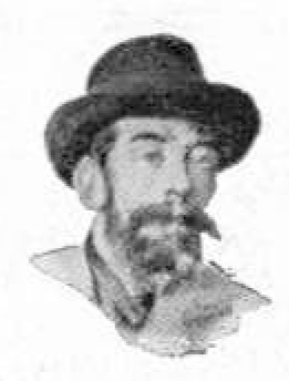 Dibujos al carbón por Daniel Zuloaga, en la redacción del Diario de Avisos.